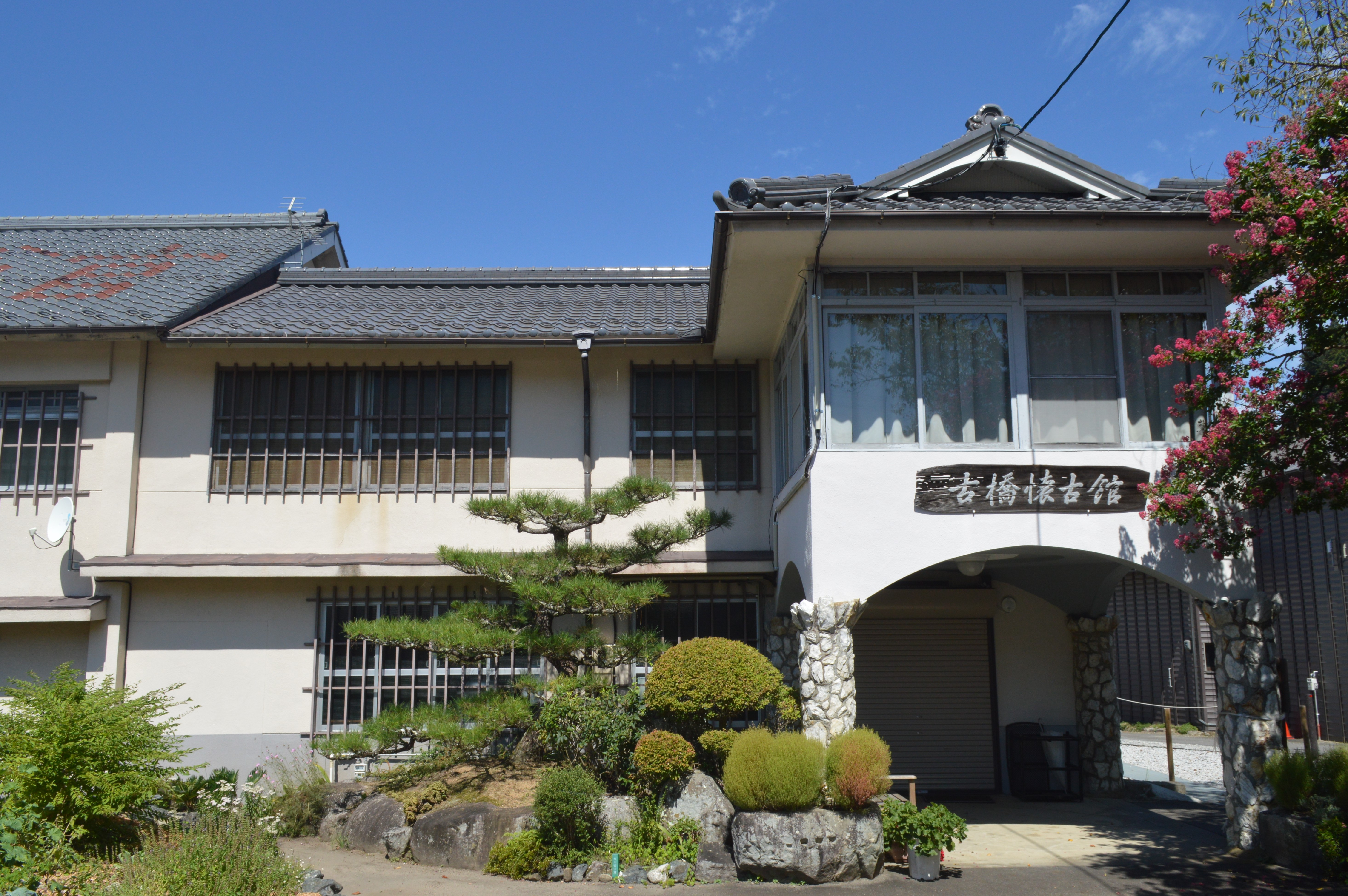 愛知県豊田市稲武町にある古橋懐古館。